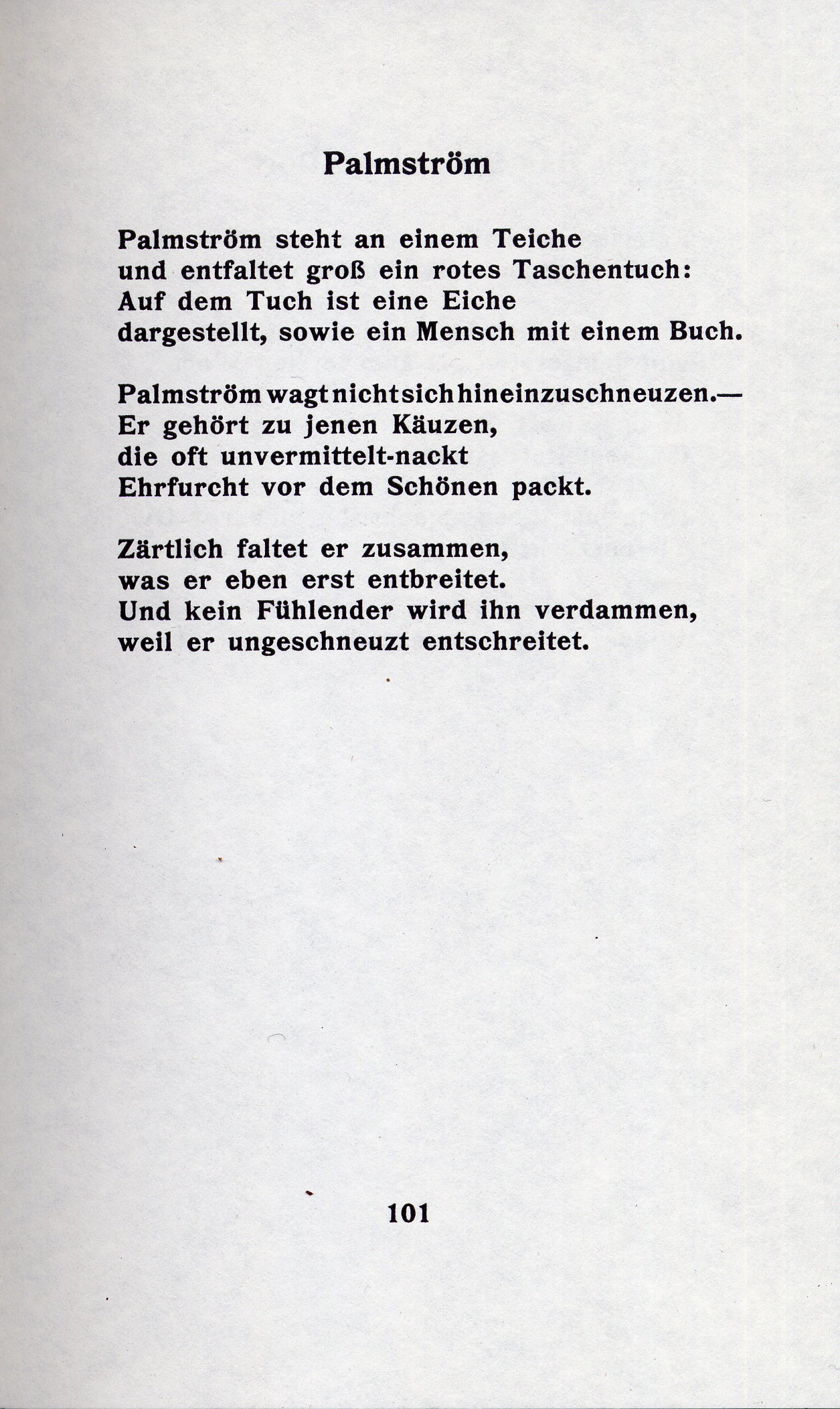 Christian Morgenstern: Palmström, Seite 101